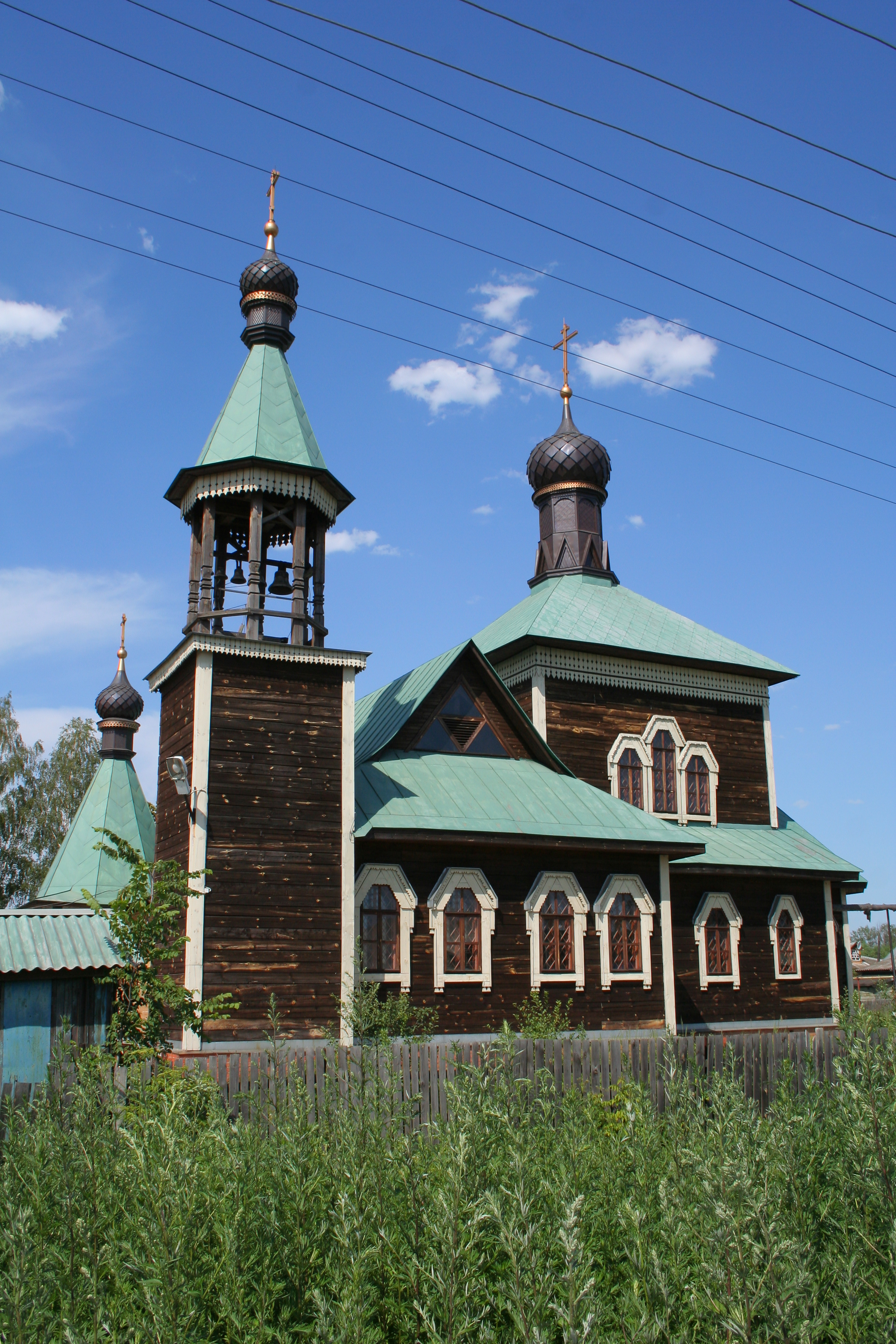 Kirche des Bischofs Athanasius von Kowrow in Petuschki, Oblast Wladimir, Russland.